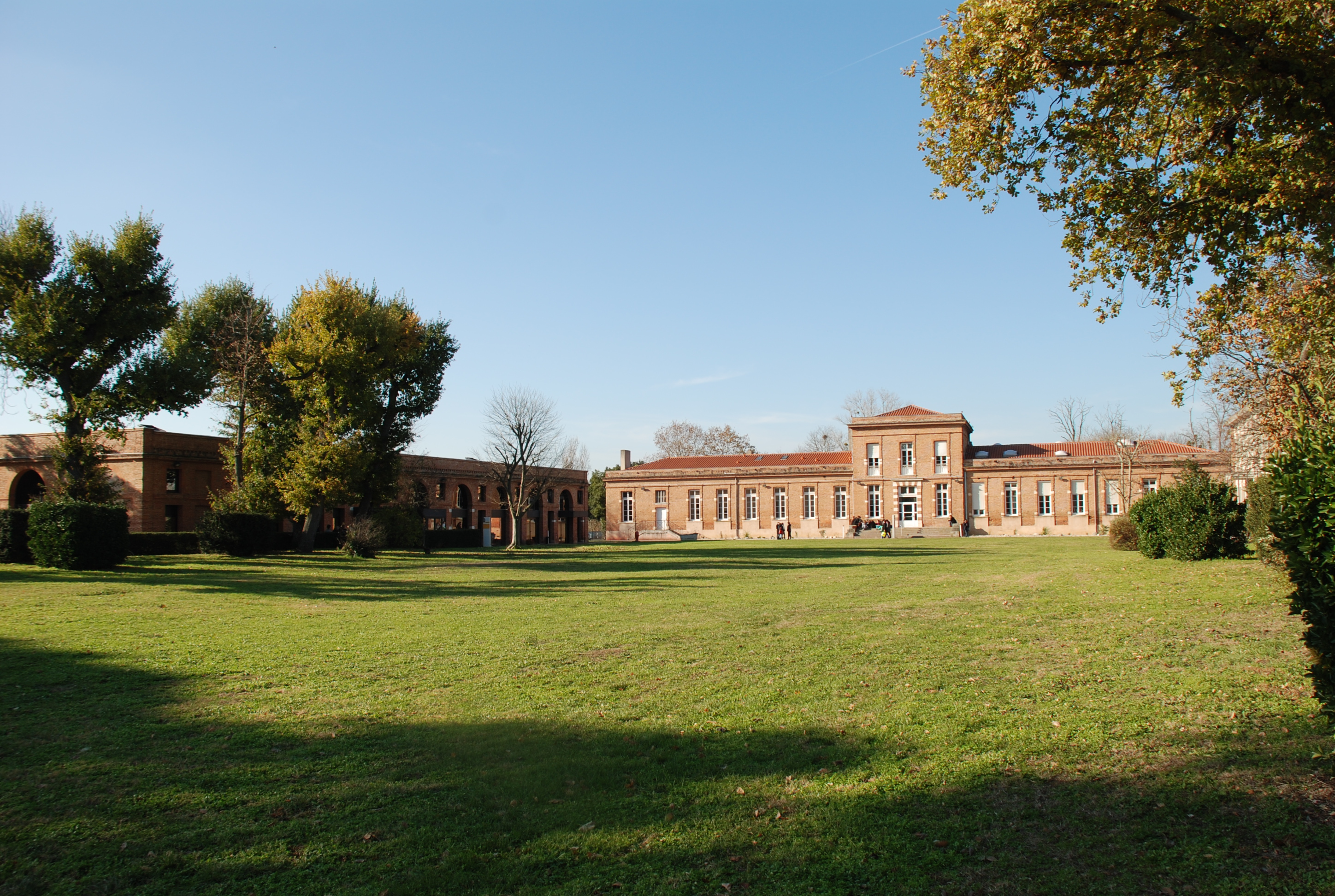 Château de Marmande (18e siècle), siège de l’École de la Croix-Rouge à Toulouse, chemin des Capelles, quartier Lardenne. Sur le domaine de ce château, autrefois la propriété d'un industriel, M. Chouvel, a été construite l’École nationale vétérinaire de Toulouse.